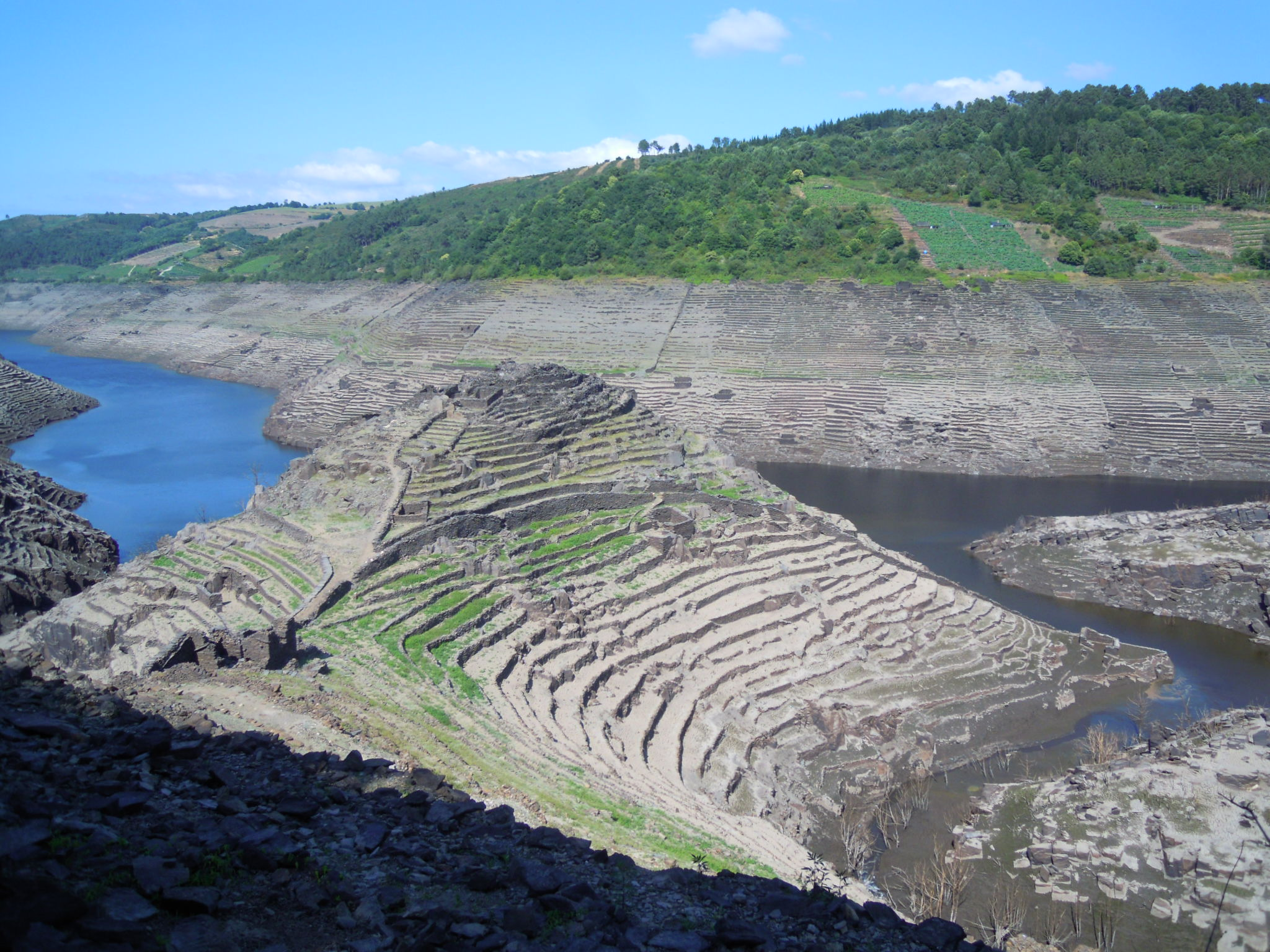 Vista de Castro Candaz, en Chantada, a carón do encoro de Belesar, no río Miño